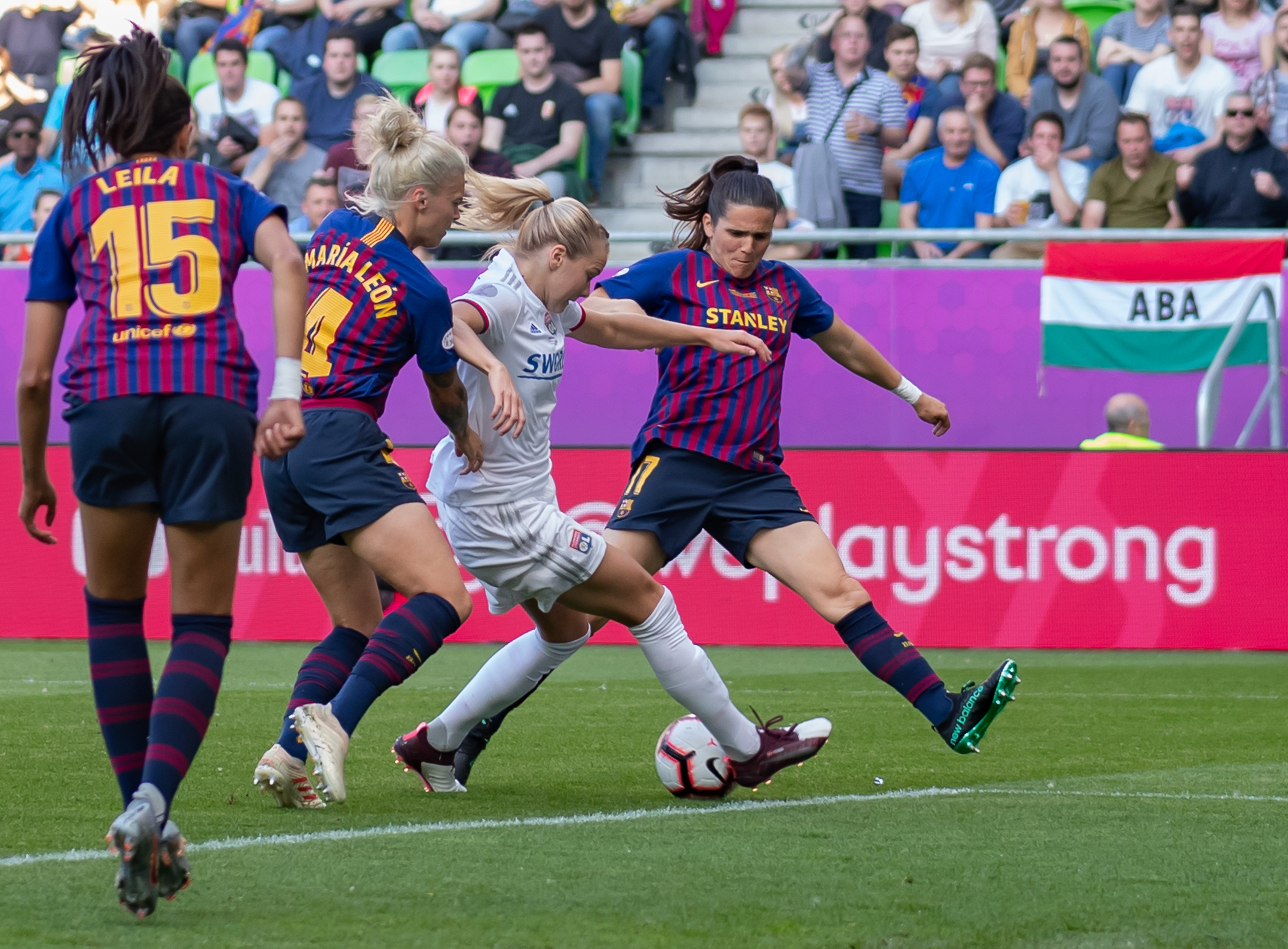 Fußball, Frauen, UEFA Women's Champions League, Olympique Lyonnais - FC Barcelona; v.li.: Leila Ouahabi (FC Barcelona, 15), Maria Leon (FC Barcelona, 4), Ada Hegerberg (Olympique Lyon,14), Andrea Pereira (FC Barcelona, 17); Aktion, action